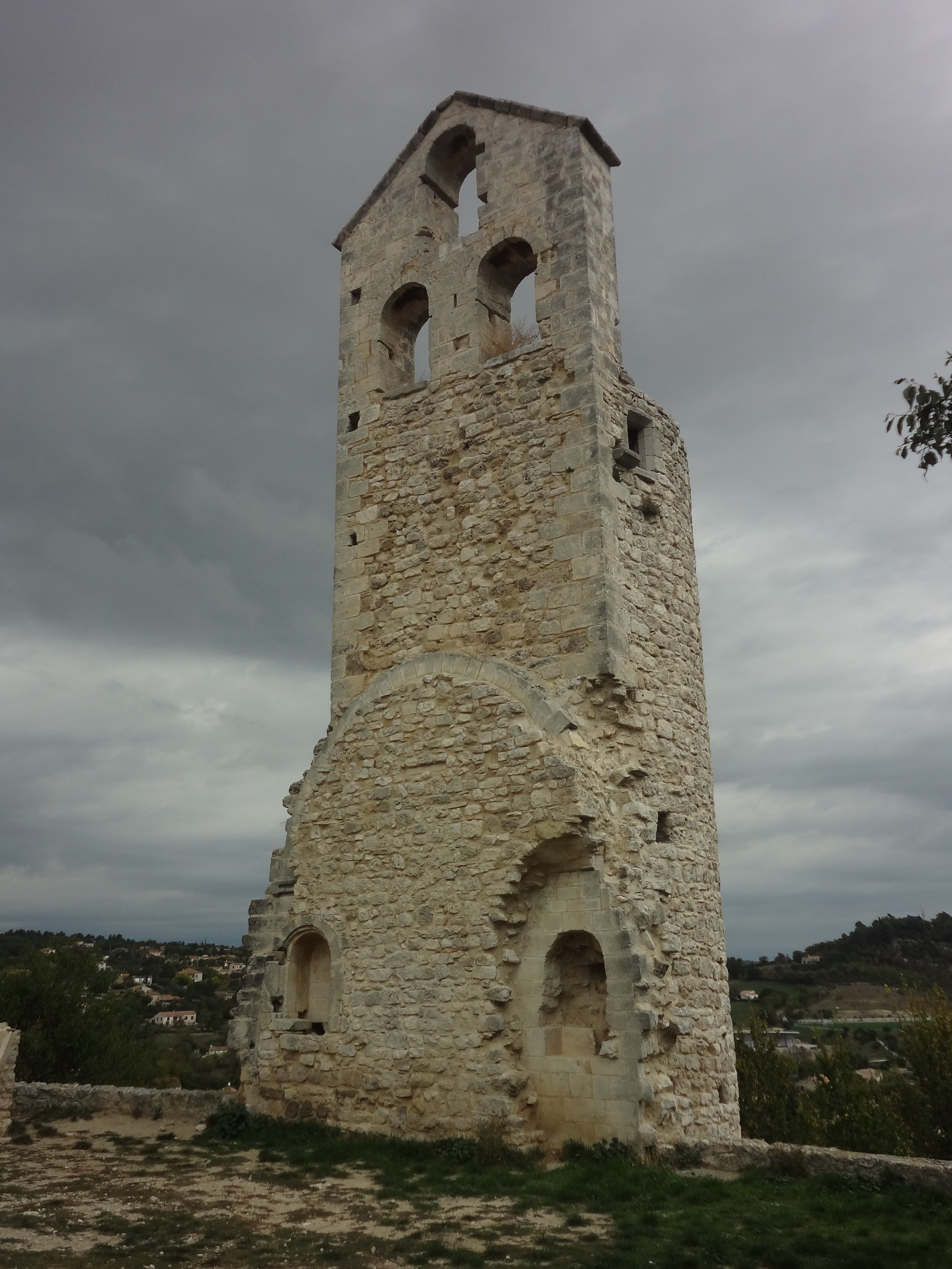 Clocher de l’ancienne église paroissiale et castrale Saint-Pierre de Reillanne